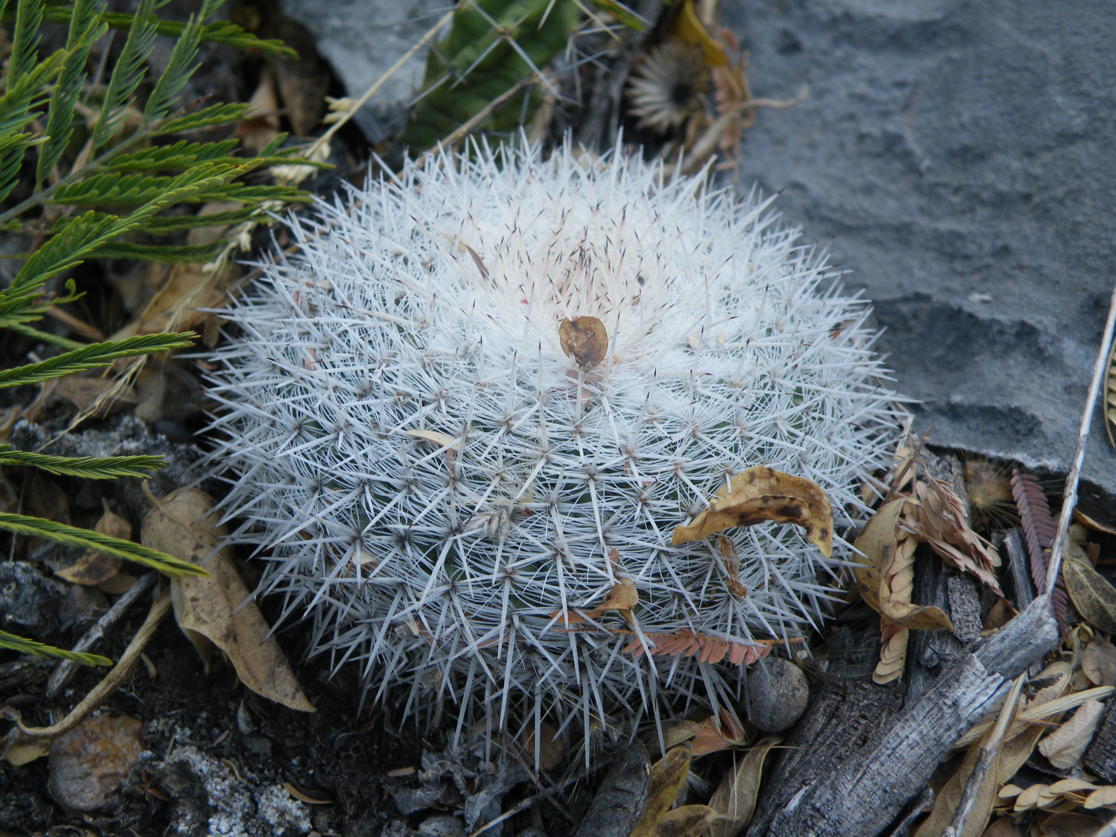 Near Guamuchil, Guanajuato